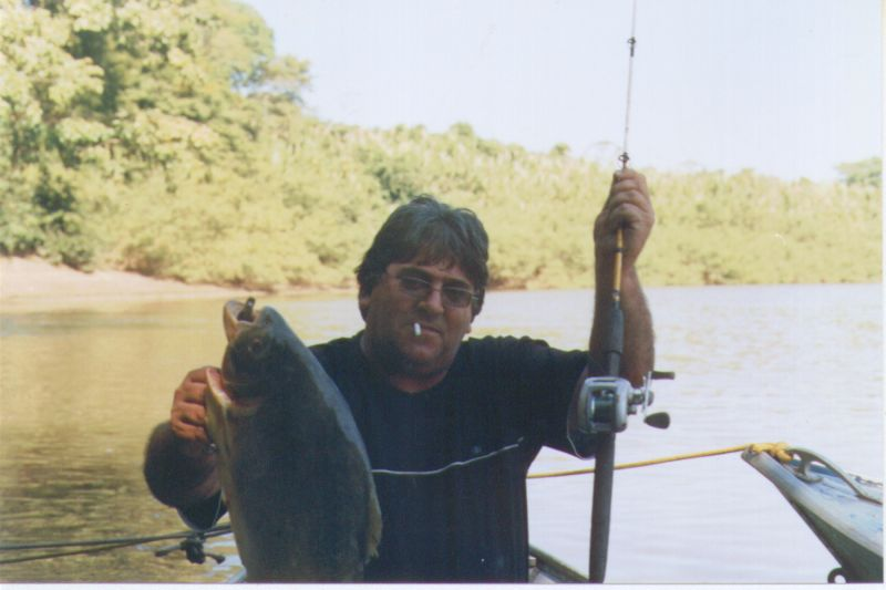 Pacú - Rio Miranda - MS